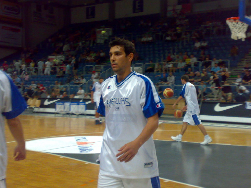 Nikolaos Zisis, griechischer Basketballspieler